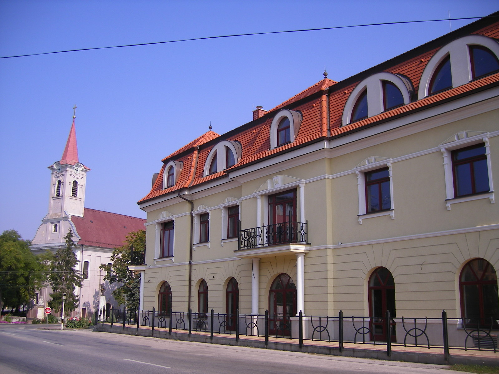 Udvard - faluközpont